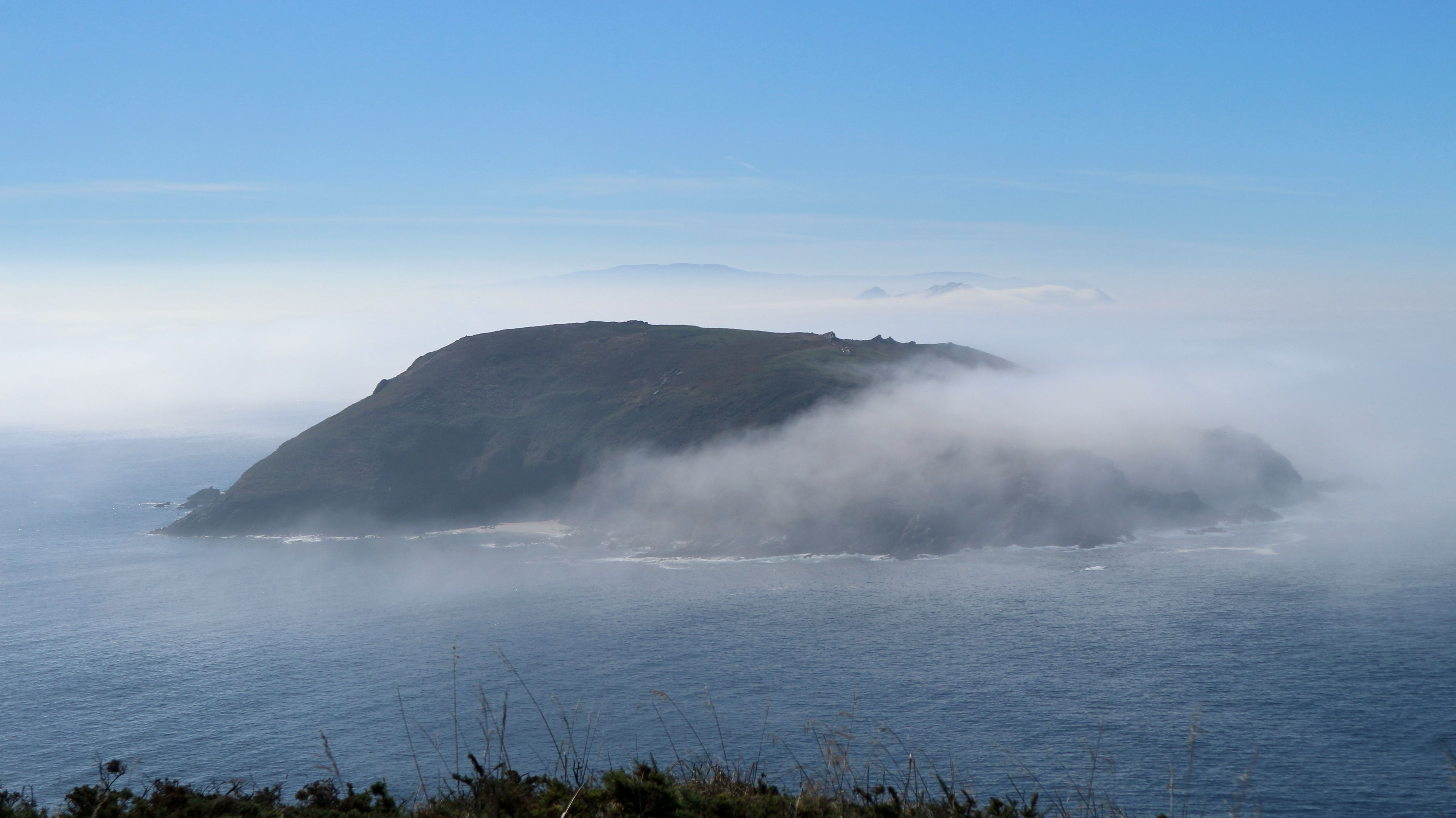 Illa de Onza vista desde o monte da Espaduada e Fedorentos. A Illa de Ons, Ons, Bueu - Parque Nacional das Illas Atlánticas de Galicia.